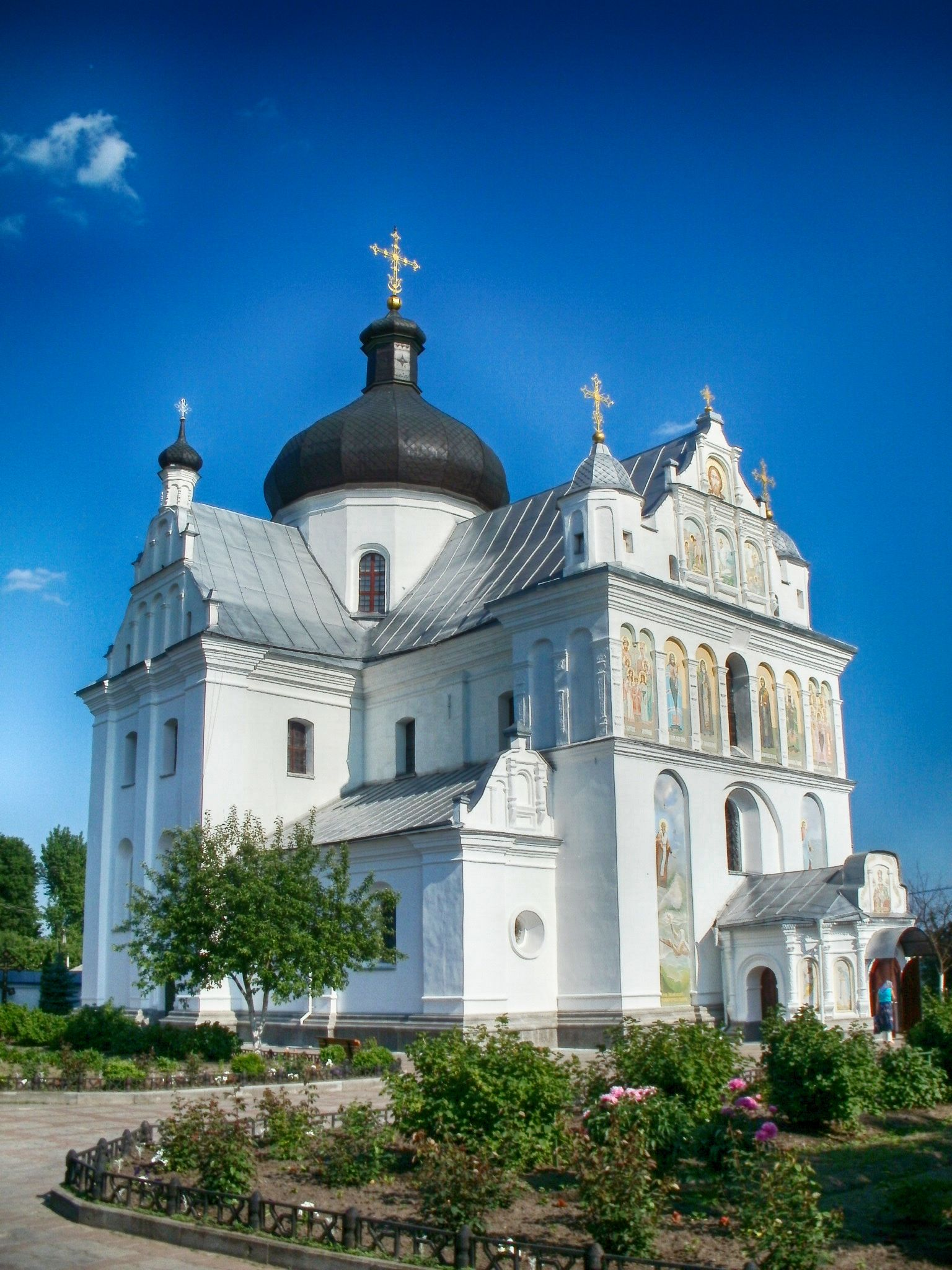 Беларуская (тарашкевіца): Комплекс Мікольскага манастыра ў межах агароджы:званіцажылы дом (шпіталь) Мікольская царквадэкаратыўнае аздабленьне царквы: фрэскі сюжэтныя, фрэскі арнаментальныя, іканастас, арнаментальная ляпнінаАнуфрыеўская царкваагароджа з уязной брамай. г. Магілёў This is a photo of Belarusian heritage monument. Reference number: 511Г000017 ( WLM)